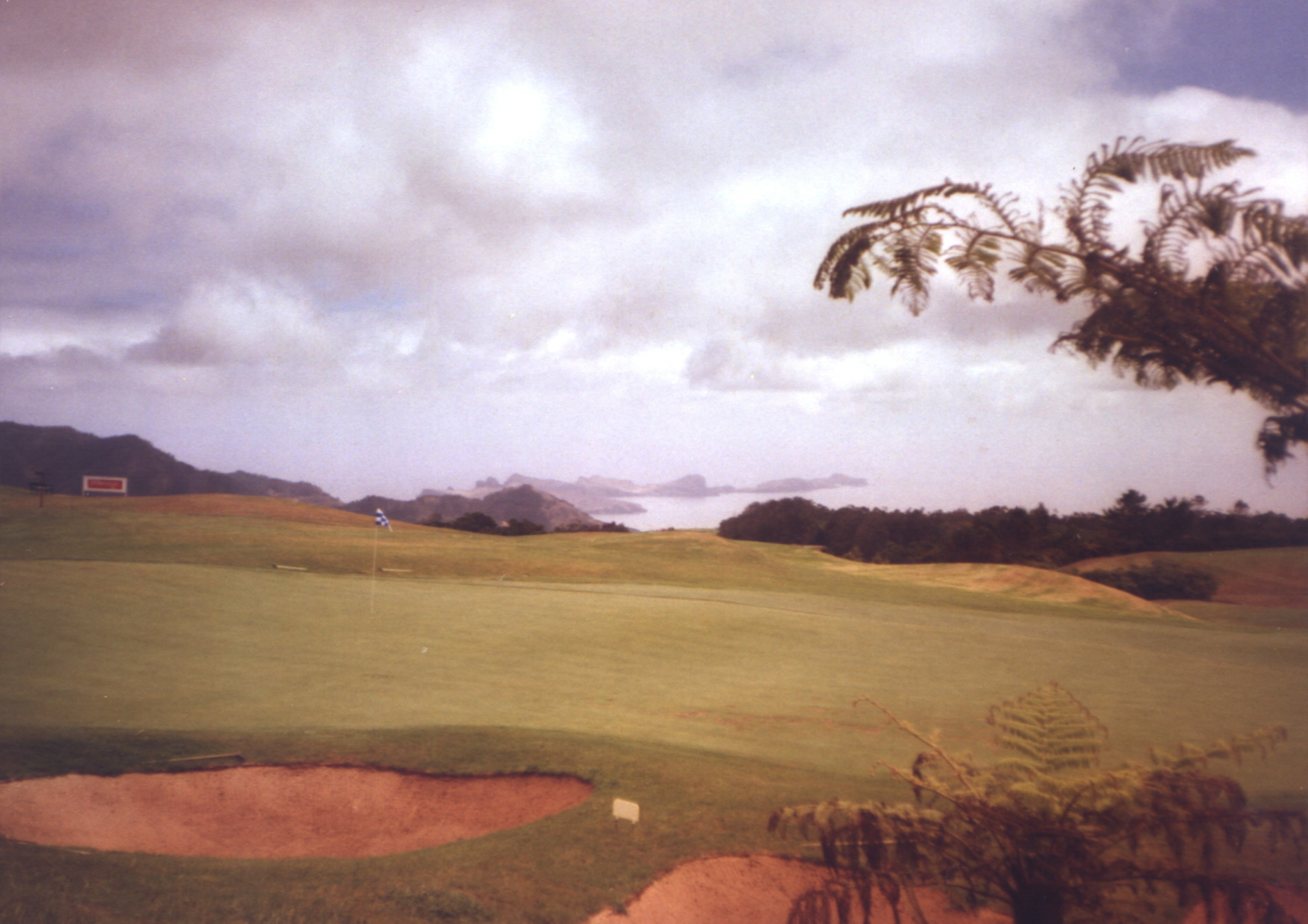 Green Santo da Serra